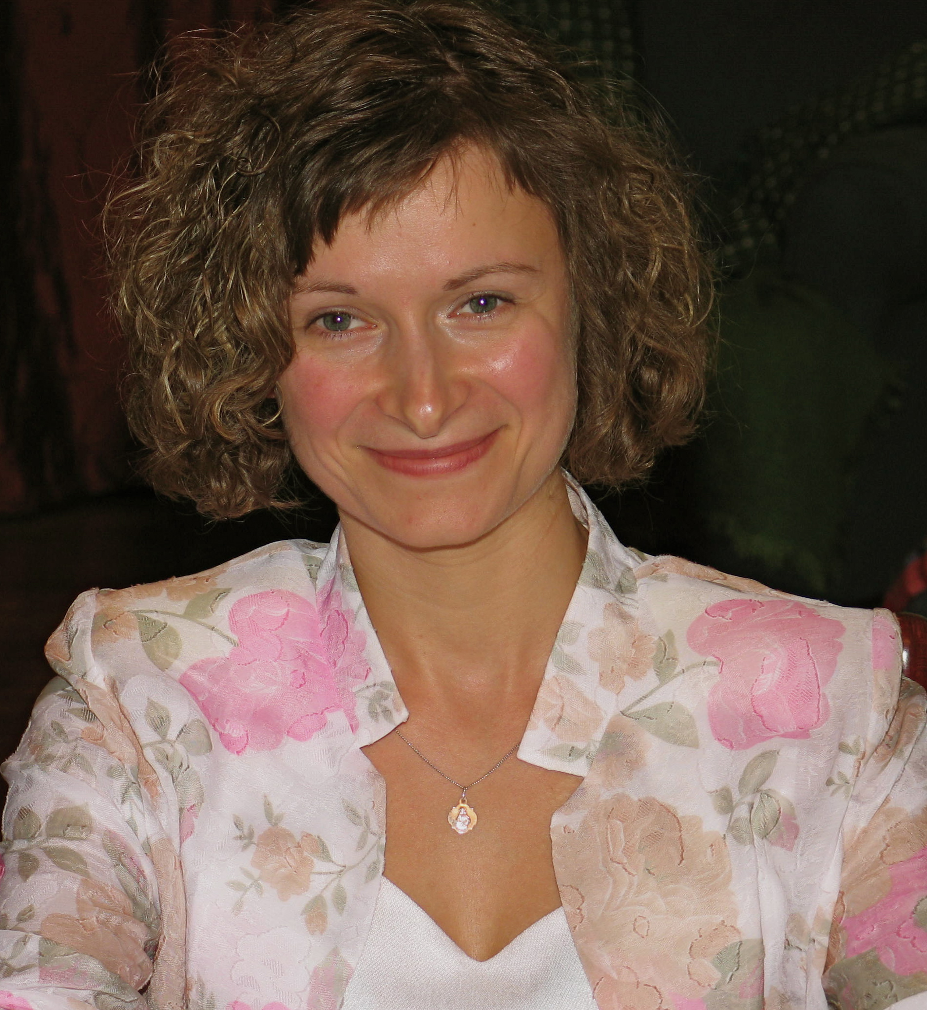 Joanna Barczyńska Poland, Warszawa 2005